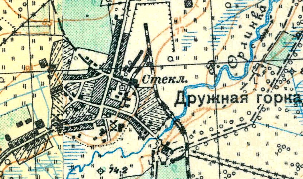 Топографическая карта Ленинградской области, квадрат О-36-25-А-б (Дружная Горка), посёлок Дружная Горка